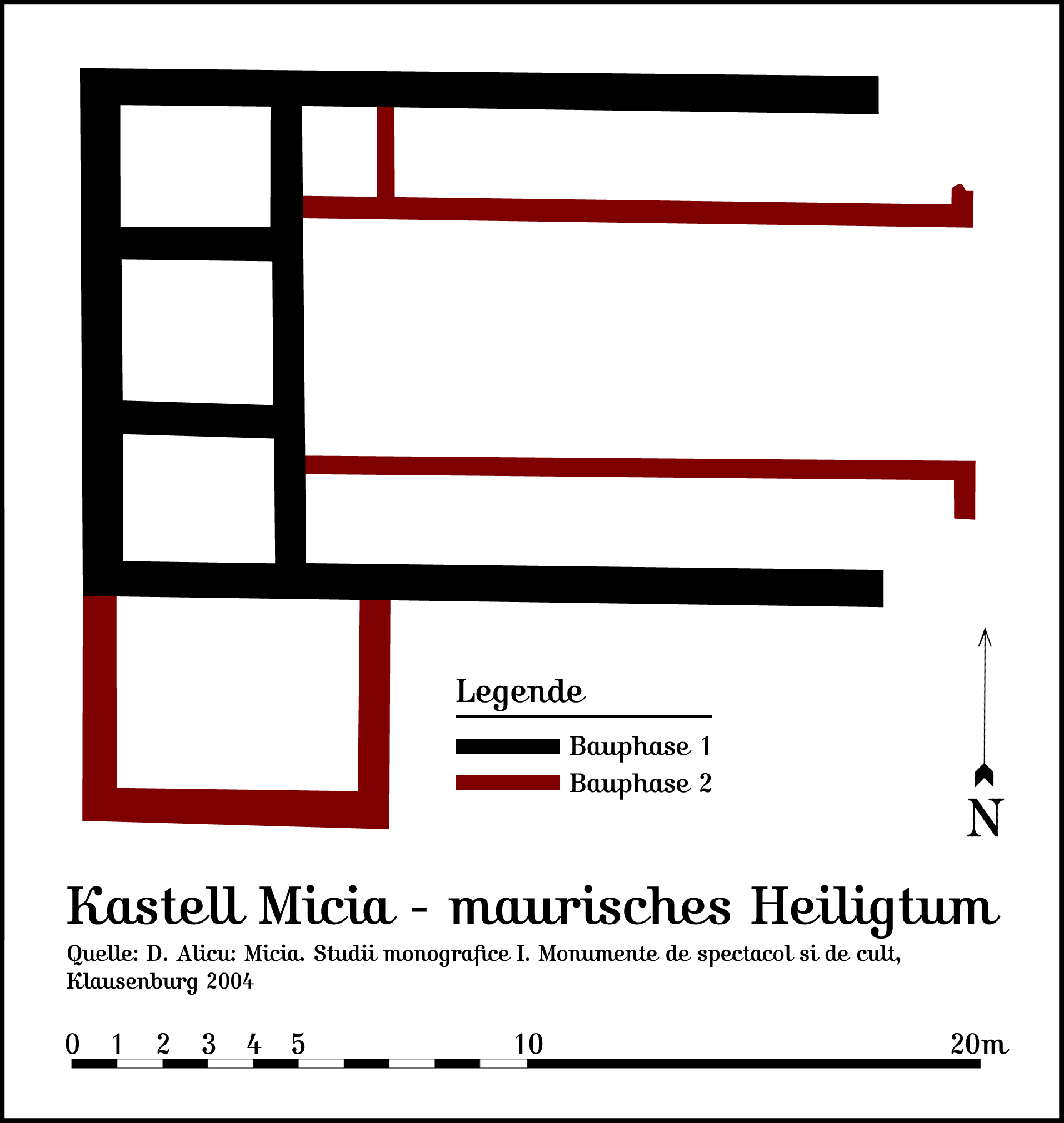 Witzel (Vețel), Siebenbürgen, Rumänien: Der maurische Tempel im römischen Lagerdorf von Micia.